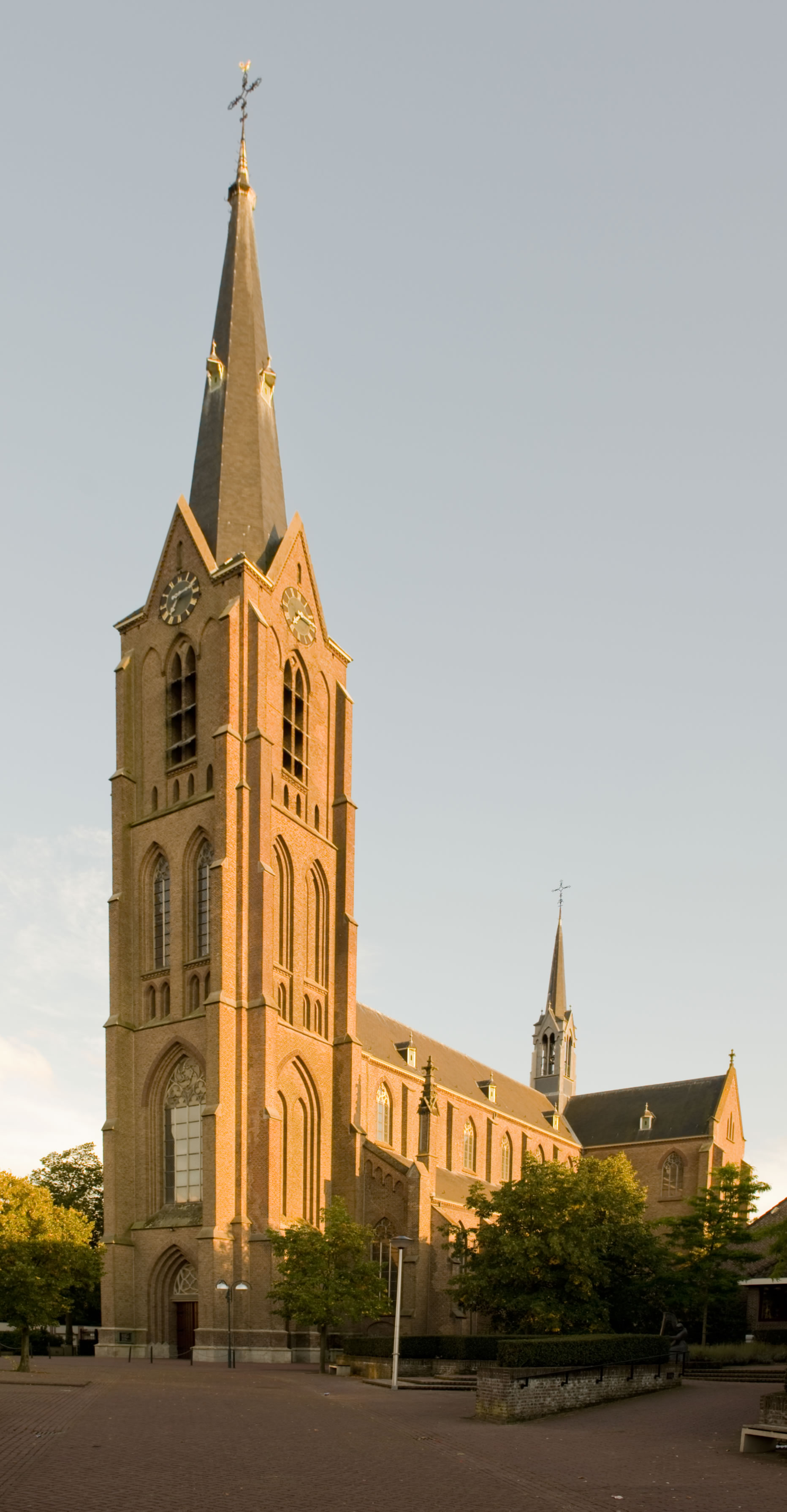 St. Jan de Doperkerk, gebouwd in 1864-1866, architect H.J.van Tulder.